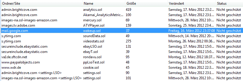 Screenshot einer Liste von Flash-Cookies auf einem PC. Markiert ist ein Cookie, das Google in Sachen E-Mail gesetzt hat.